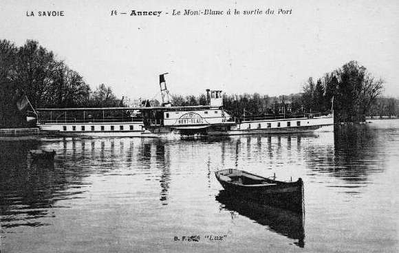 Bateau Mont-Blanc sur le lac d'Annecy, voir les Bateaux de croisière du Lac d'Annecy